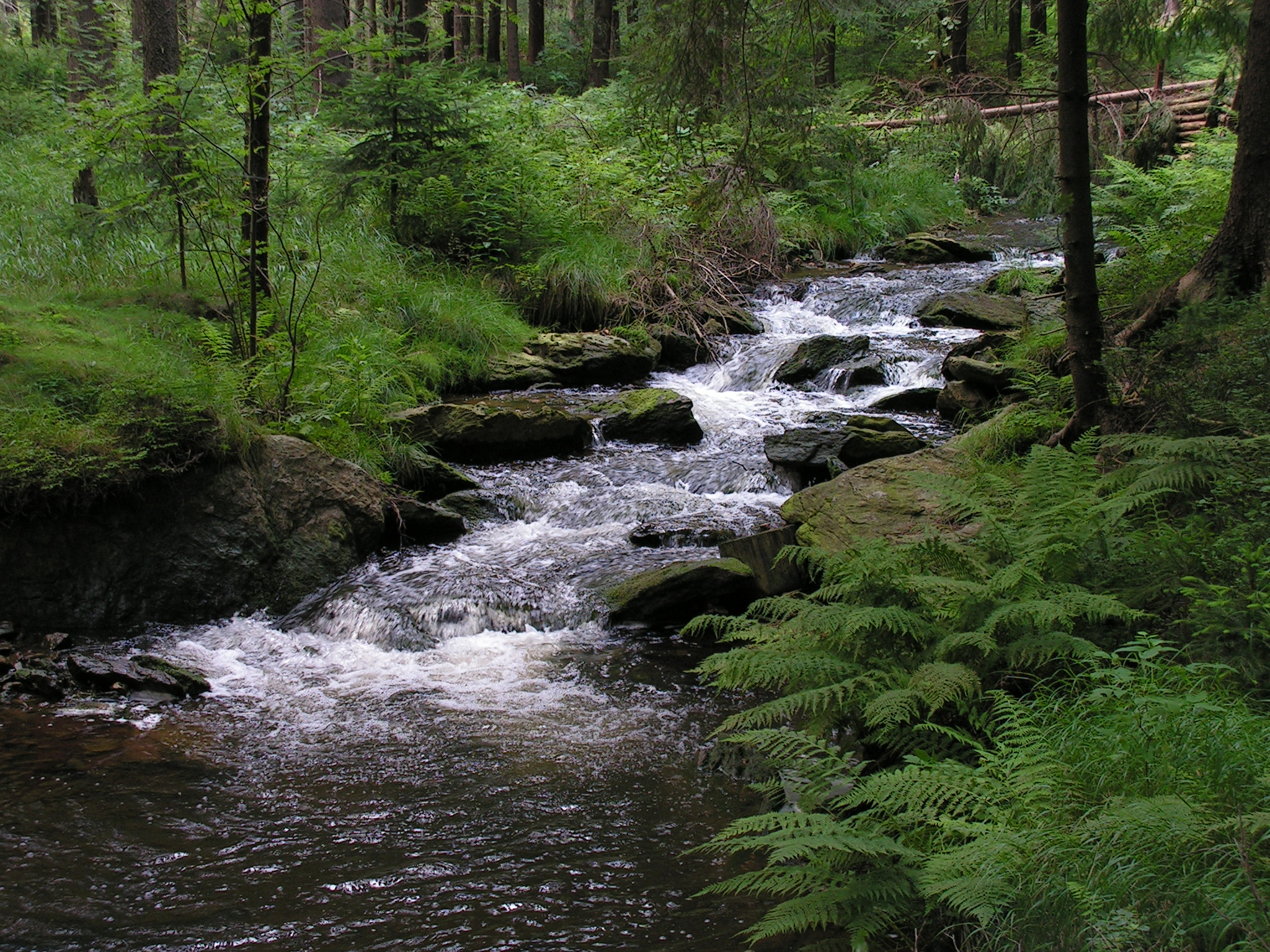 Greifenbach zwischen Geyer und Ehrenfriedersdorf